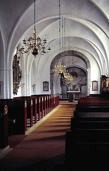 Kirkerujmmet Hvirring kirke ligger i Hvirring Sogn, i det tidligere Nim Herred Skanderborg Amt, nuværende Hedensted Kommune, Region Midtjylland. .